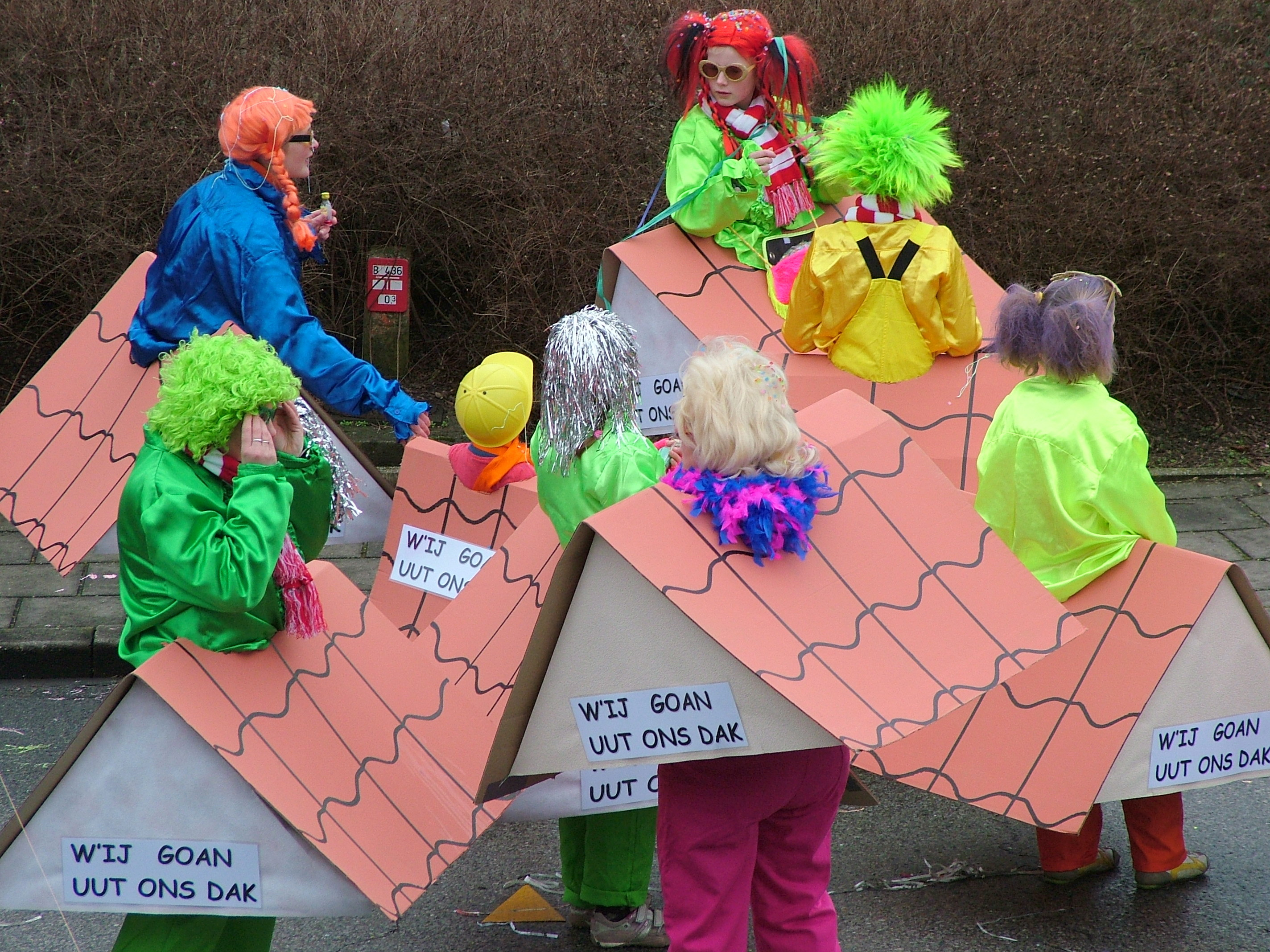 Karneval in Silvolde. "W'ij goan uut ons dak", eine niedersächsische Variante von "Wij gaan uit ons dak" (etwa: wir flippen aus).